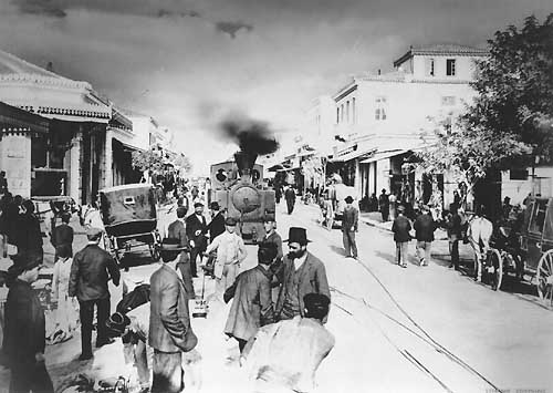 Βόλος, η οδός Δημητριάδος το 1905